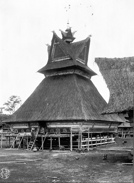 Foto. Een Karo Batak huis